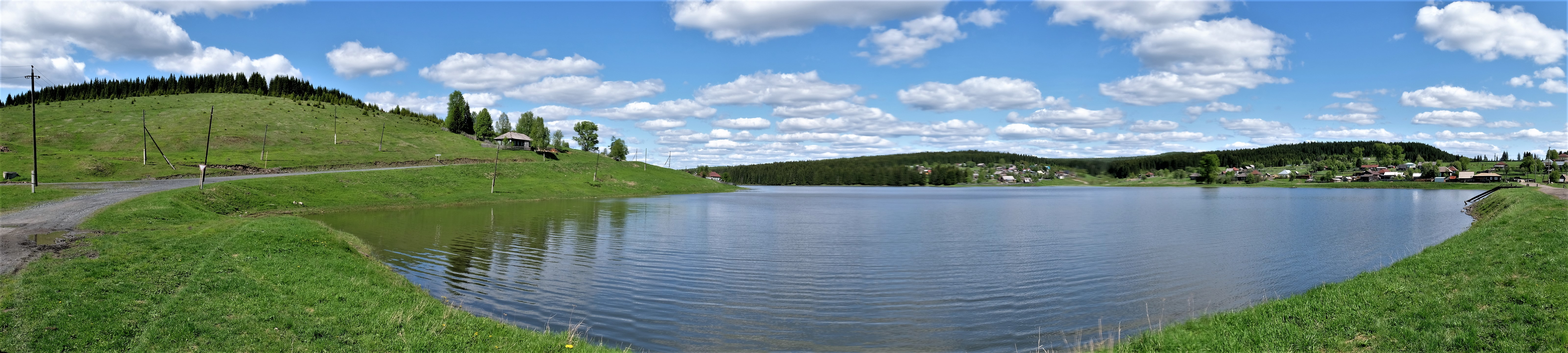 Посёлок Старый Бисер Горнозаводского района Пермского края. Панорама плотины и пруда.